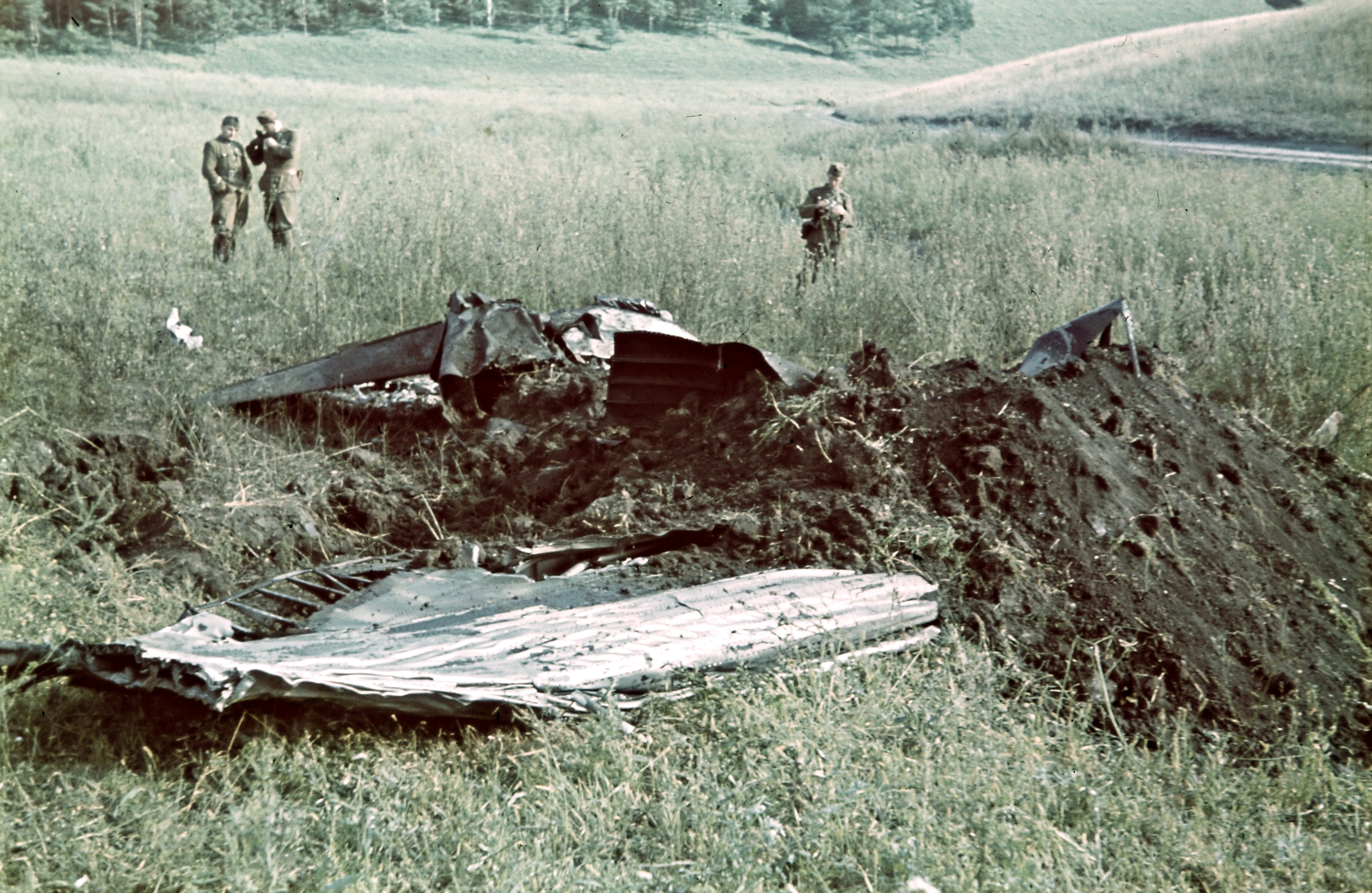 Horthy István lezuhant repülőgépének roncsai 1942 augusztus 20-án. Location: Russia, Alekseyevka Tags: second World War, eastern front, Soviet Union, colorful, wreck, Royal Hungarian Air Force, accident, airplane, transport, Italian brand Title: Horthy István lezuhant repülőgépének roncsai 1942 augusztus 20-án.